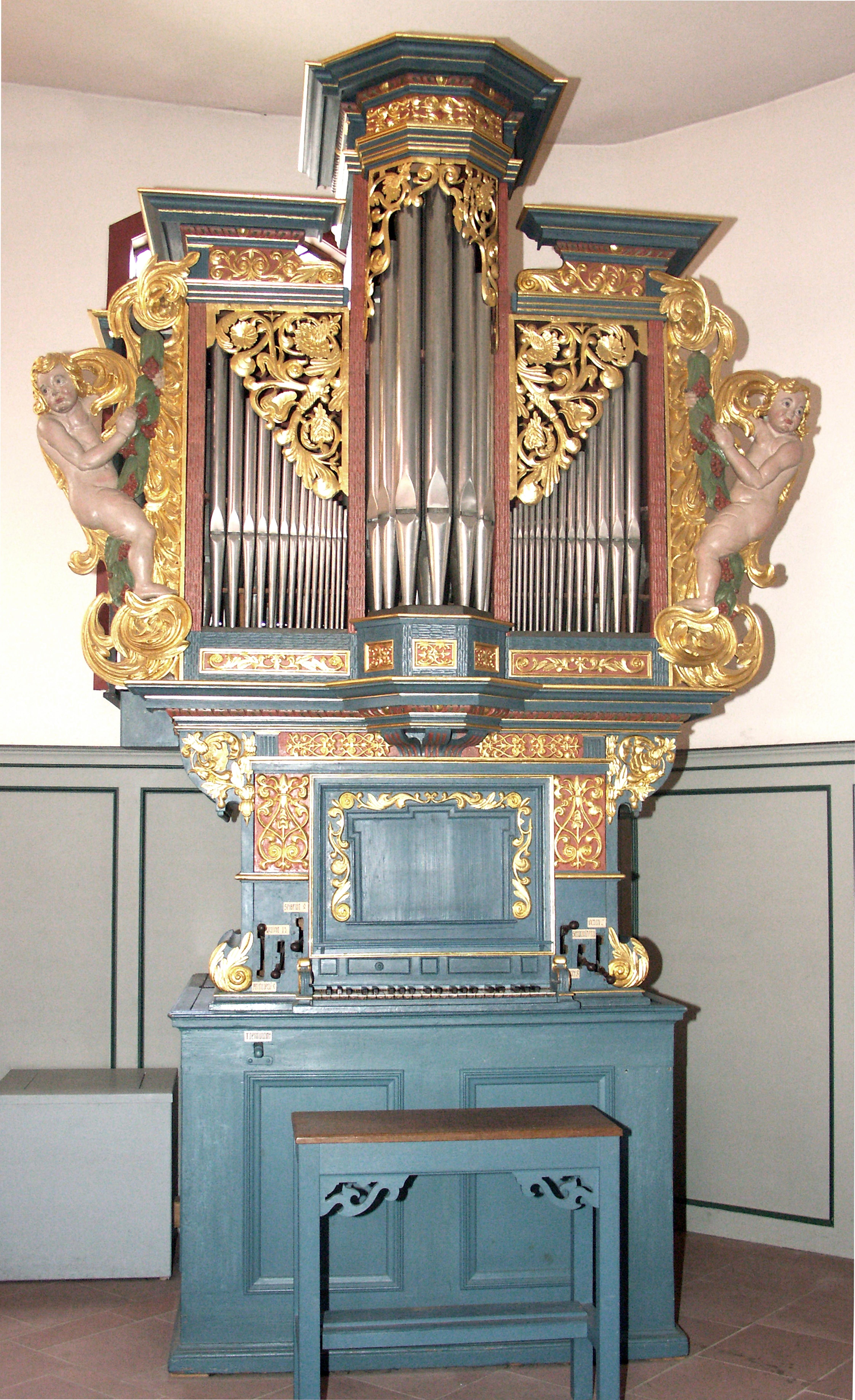 Orgel in Worfelden, Ev. Kirche